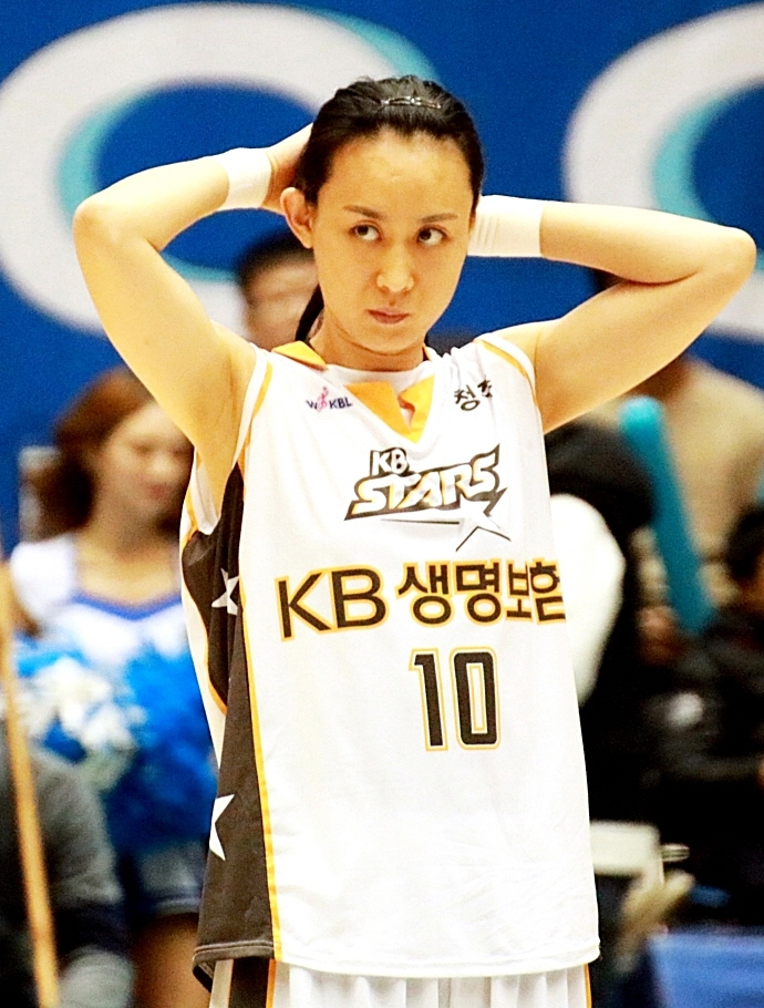 160220 여자농구 KDB생명 vs KB스타즈 직찍